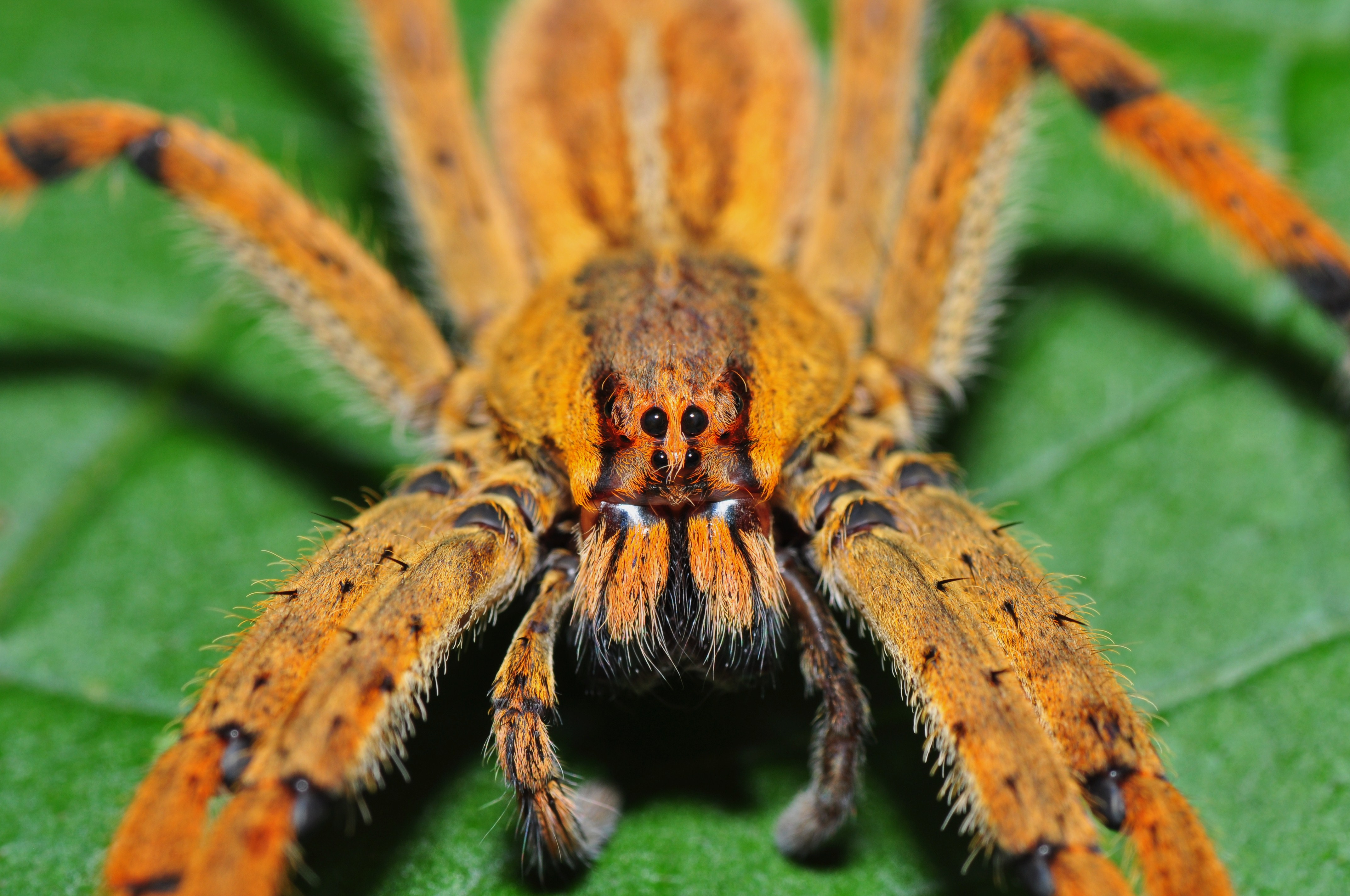 Wandering spider, Cupiennius sp (Ctenidae)